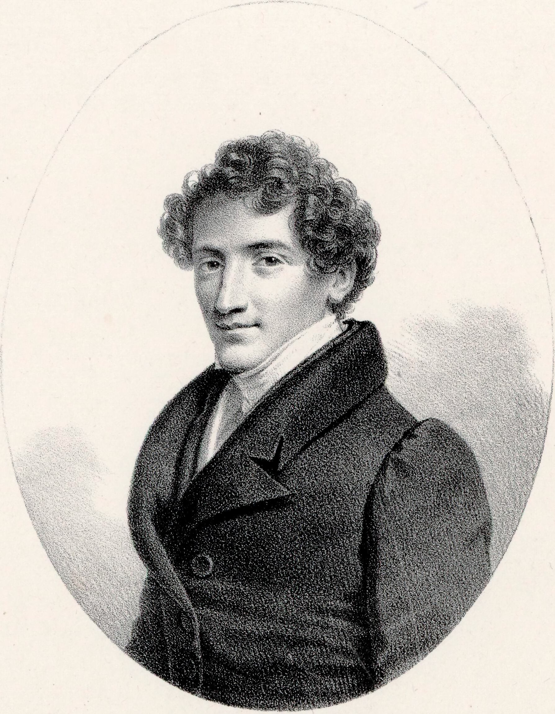 Jean-Baptiste Chollet, comédien chanteur (opéra-comique)